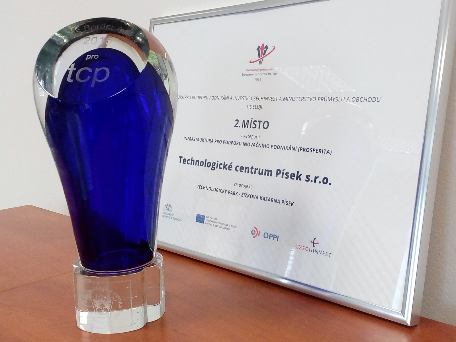 Ocenění Cross Border Award udělené v roce 2015 TCP